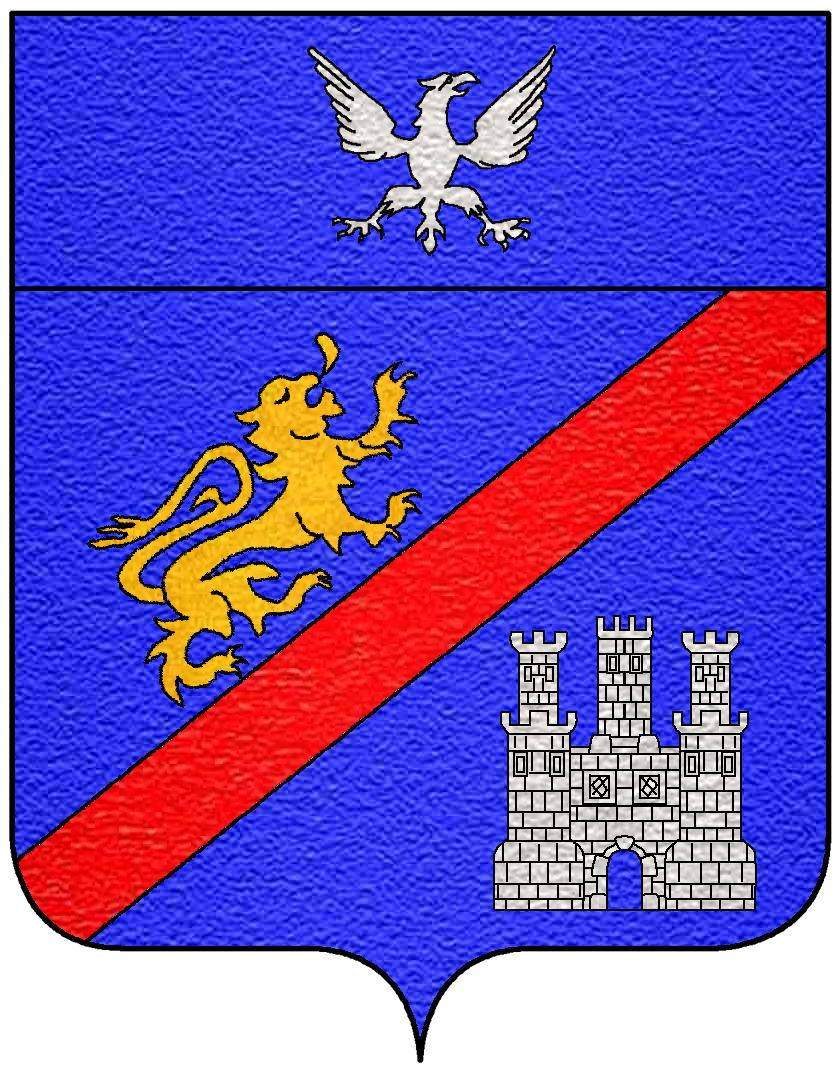 Stemma della famiglia Ramirez di Montalvo